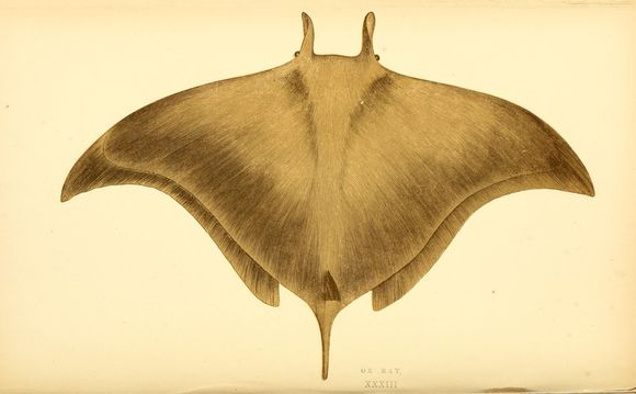 Скат рода мобул